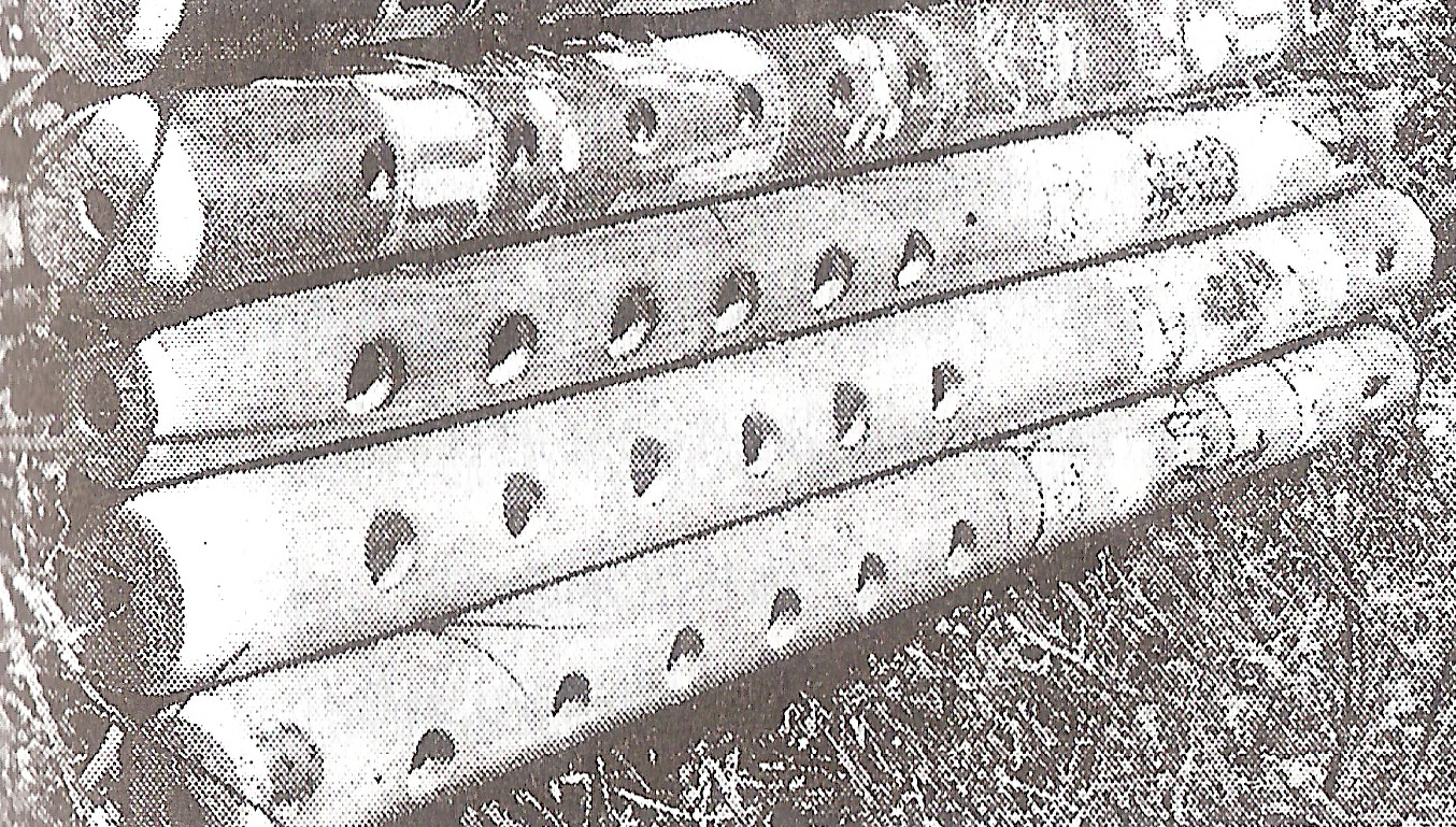 குழல் - சங்ககால இசைக்கருவி. பத்துப்பாட்டு செய்தி உரை என்னும் எனது நூலிலிருந்து எடுத்துப்பதிவேற்றப்பட்டது.